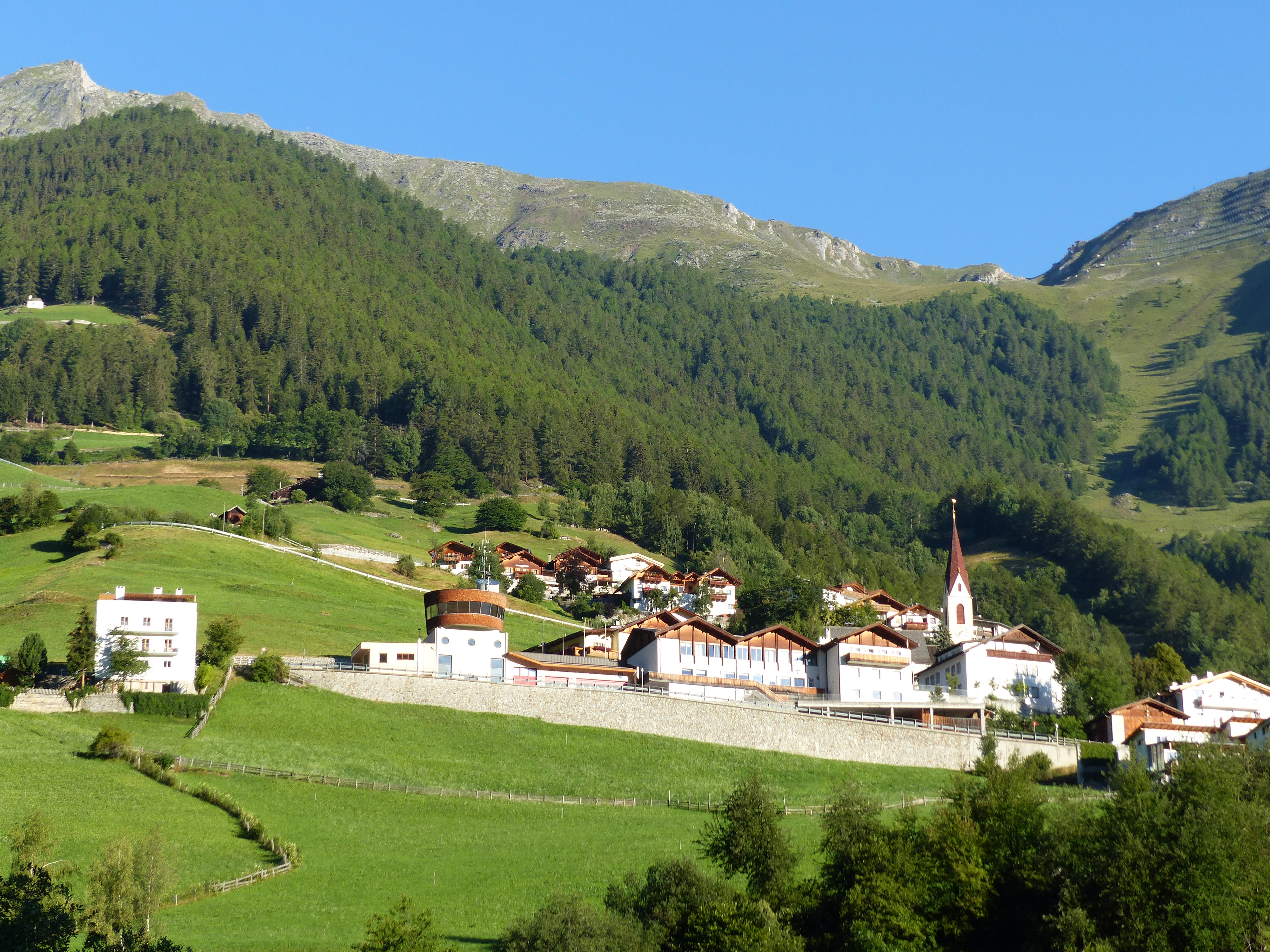 Martell Dorf. Im Hintergrund (rechts) die Göflaner Scharte